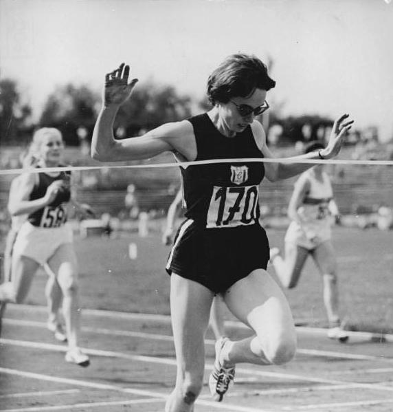 Hannelore Räpke Zentralbild Gößler 7.8.1961 Deutsche Leichtathletik-Meisterschaften am 6. und 7.8.1961 im Dresdener Steyer Stadion. UBz: Deutsche Meisterin über 20 m wurde Hannelore Räpke vom SC Chemie Halle in 23,9 Sekunden.